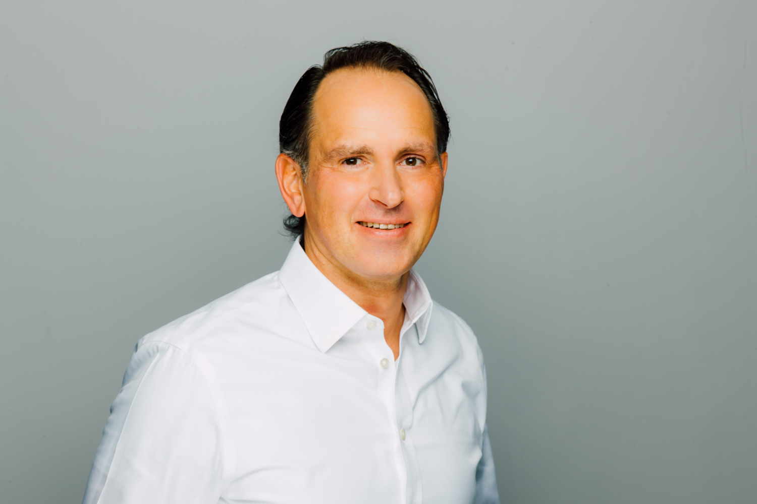 Ernst Karl Schassberger, Sternekoch